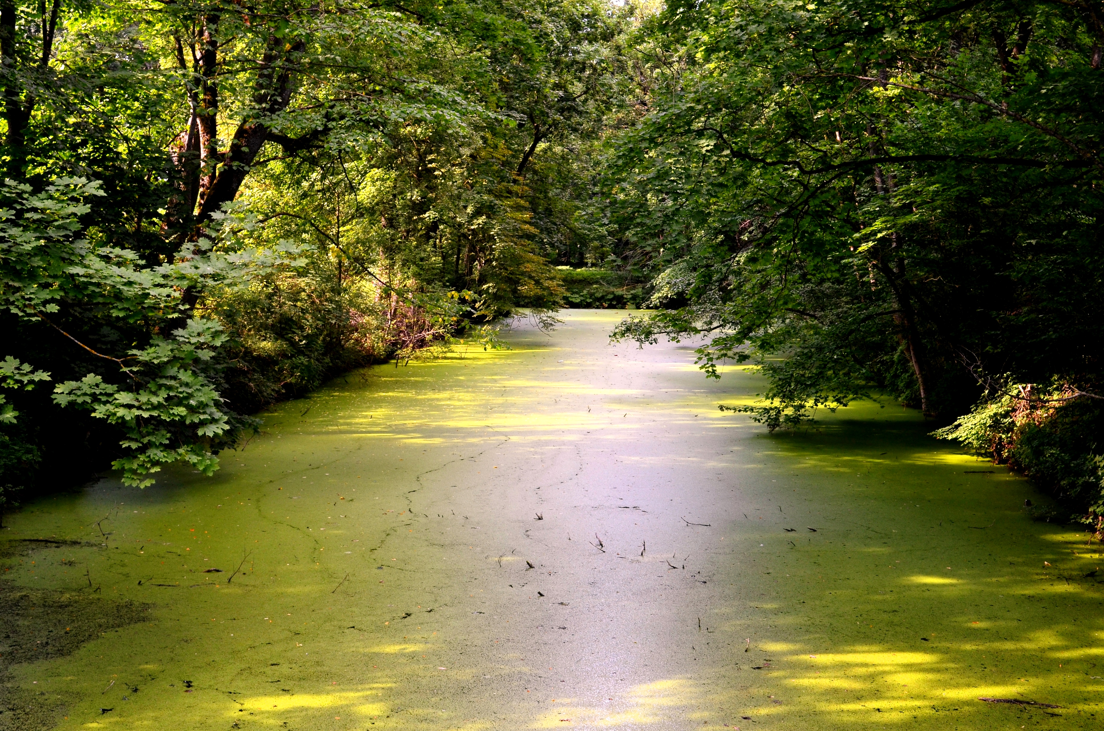 Tvenkinys Akademijos parkas, Akademija, Kėdainių raj.